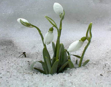 Snøklokker.